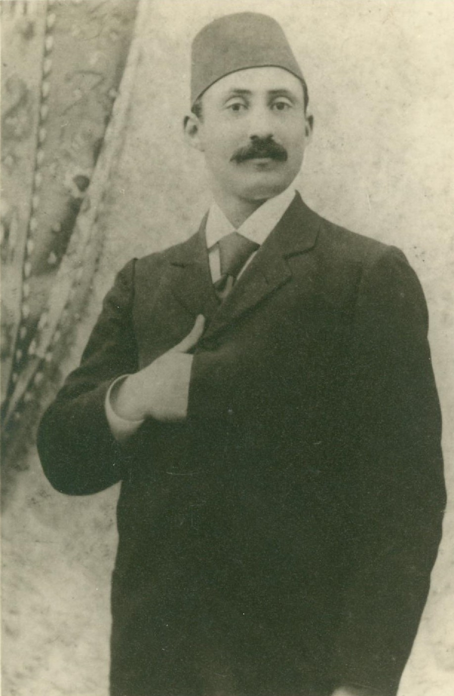 נחום גרינשפון מגיע לפלשתינה, 1 באפריל 1902